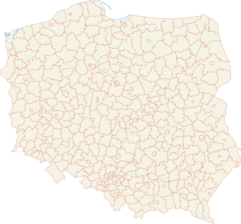 Mapa administracyjna Polski z zaznaczonymi granicami powiatów, stan na 1 stycznia 2007. Autor: Aotearoa Administrative map of Poland with borders of powiaty (counties), as of January 1, 2007. By Aotearoa